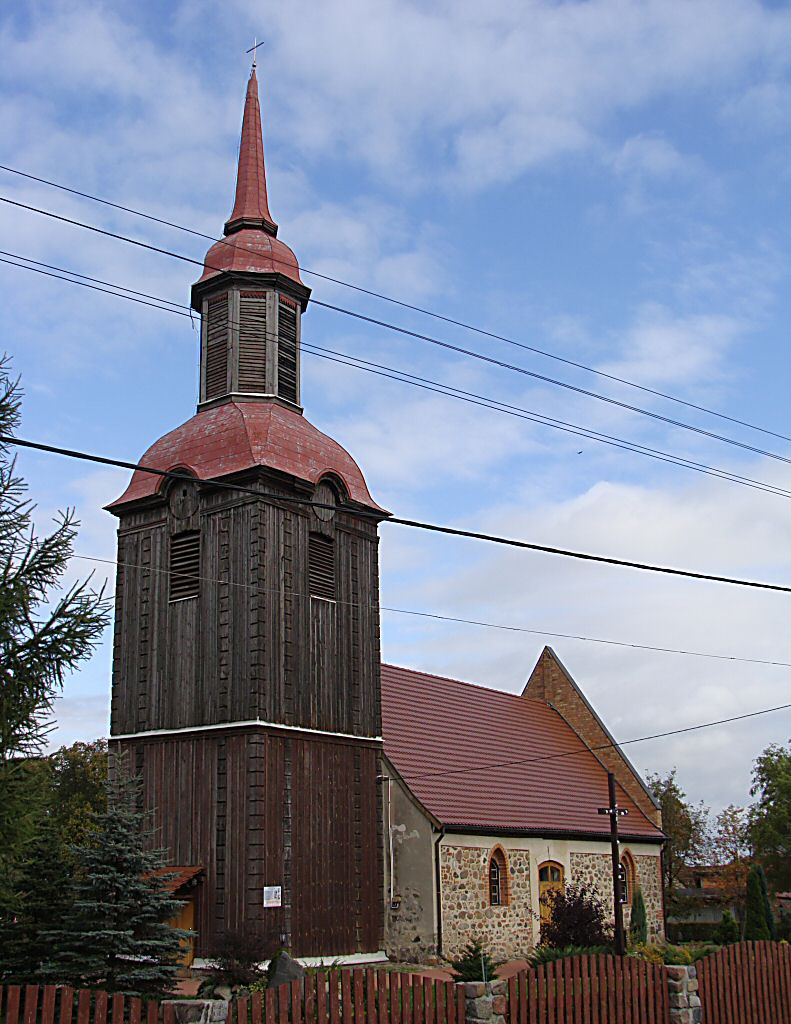 Przęsocin - kościół filialny p.w. Wniebowzięcia NMP (zabytek nr rejestr. 550)